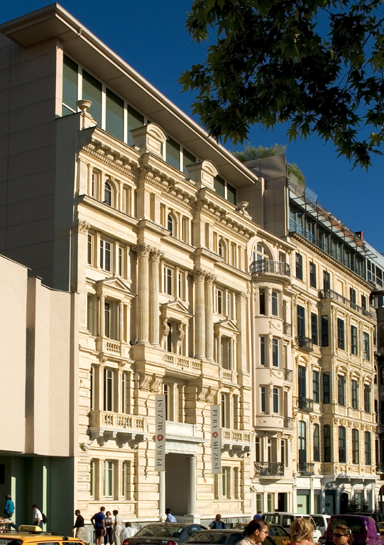 Pera Müzesi'nin cephesi korunarak inşa edilen binası.